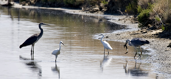 Dans les marais à Loix - Île de Ré - Photo issue de ma banque d'image